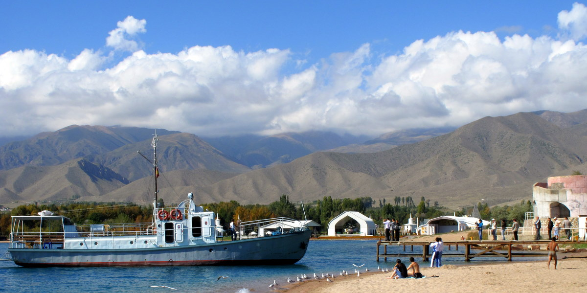 Issyk-Kol floating cafe